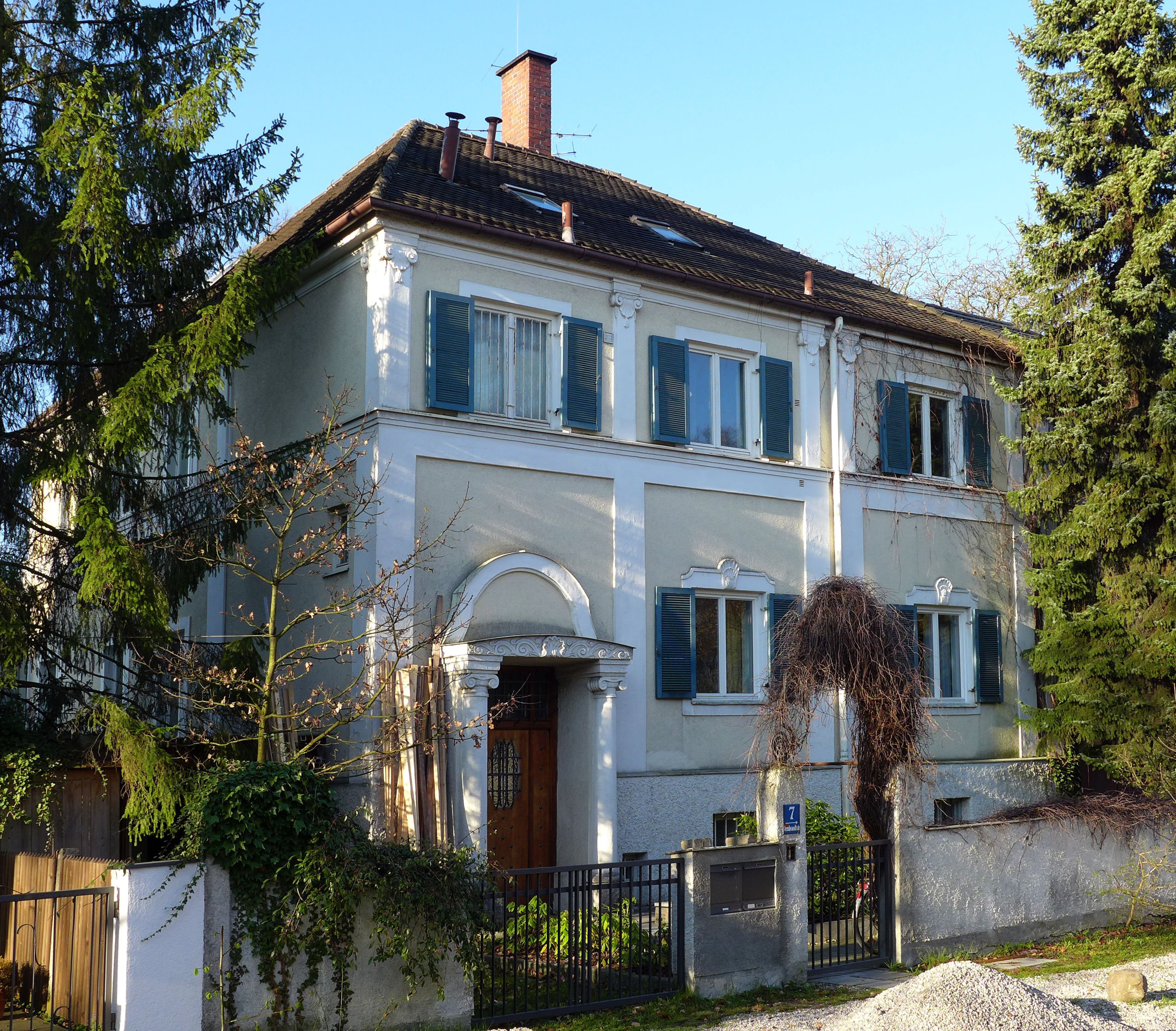 Rembrandtstr. 7, München